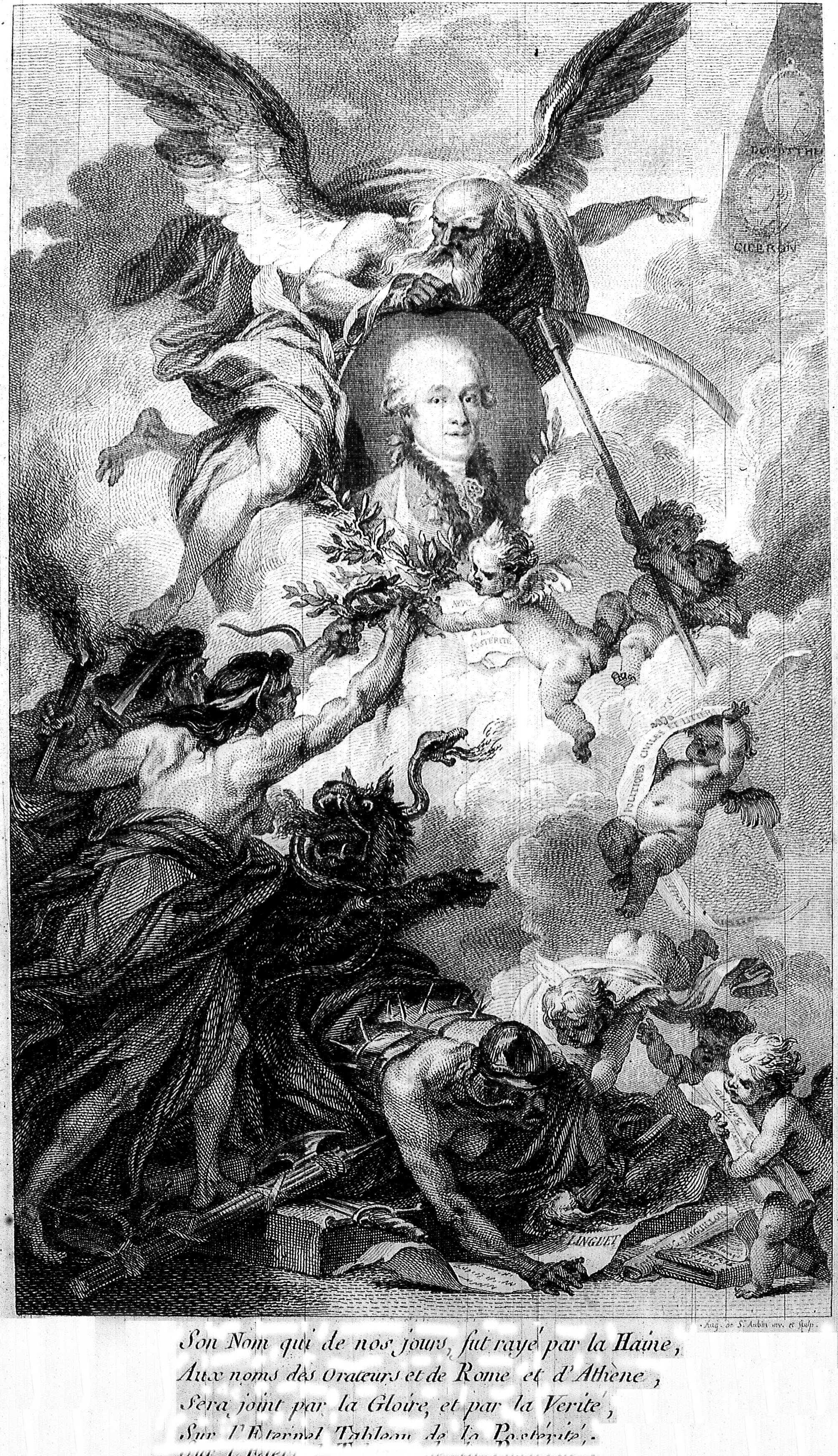 d'après une peinture de Greuze issu de la bibliothèque de Reims.